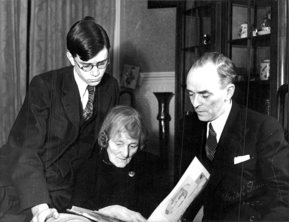 Oppositionsledaren Seán MacBride med sin mor Maud Gonnie MacBride (en ungdomsdröm för W. B. Yeats) och sin son.